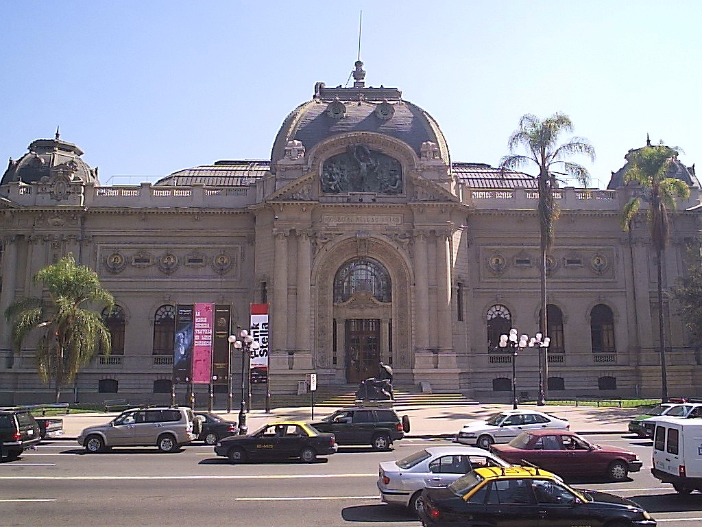 Museo de Bellas Artes Autor:Alstradiaan Alstradiaan Blog Fecha:Abril de 2005 Fotografía tomada con una cámara digital Olympus camedia D-395 de 3.2 megapixeles